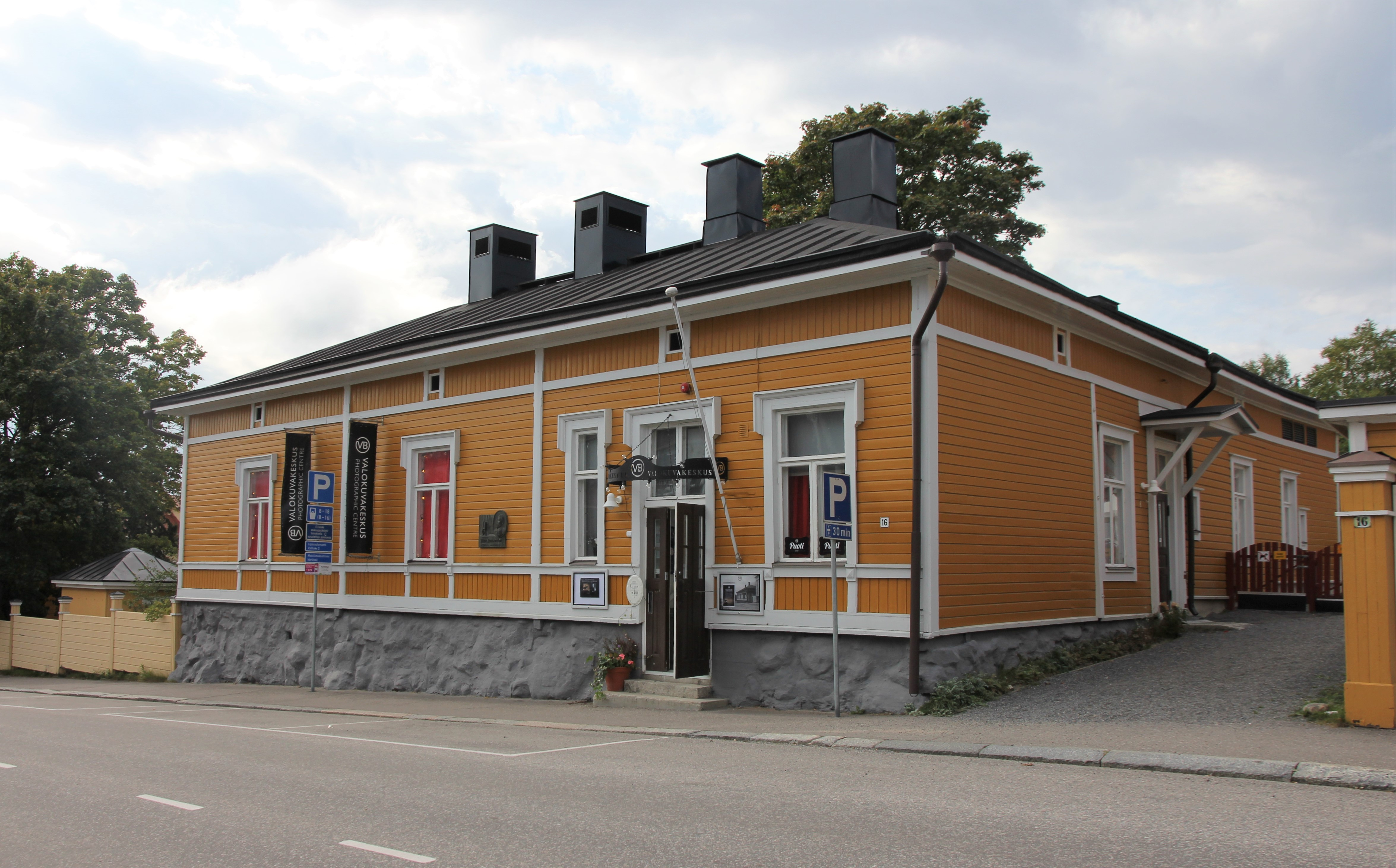 Victor Barsokevitsch -valokuvakeskuksen rakennus Kuninkaankatu 16:ssa, Kuopion Väinölänniemen kaupunginosassa. Puurakennus kuuluu osana Museoviraston valtakunnallisesti merkittäväksi luokiteltuun rakennetun kulttuuriympäristön kohteeseen Kuopion Snellmaninpuisto, tuomiokirkko ja puukorttelit.